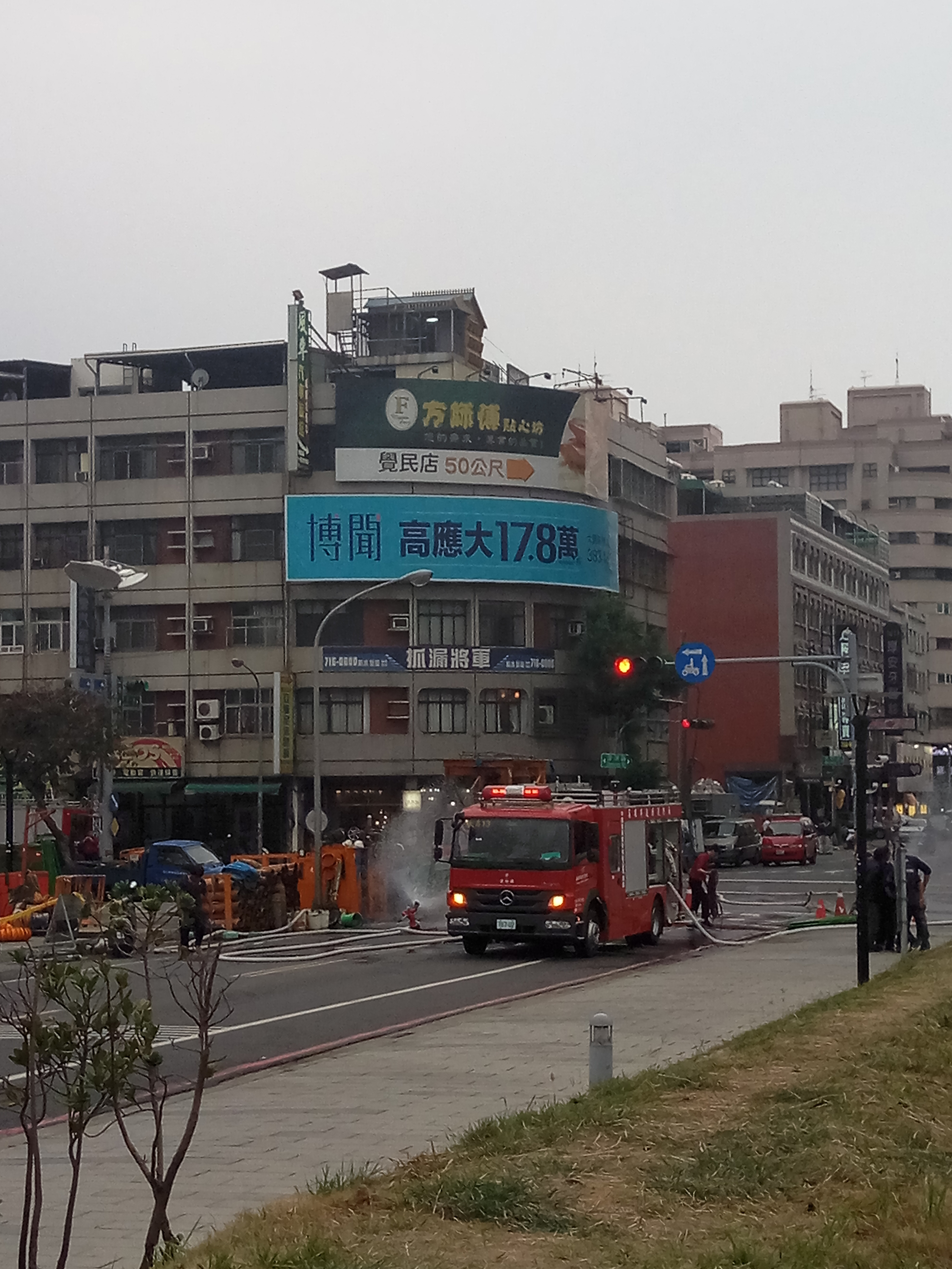 2017年3月17日高雄市三民區下水道氣爆事故